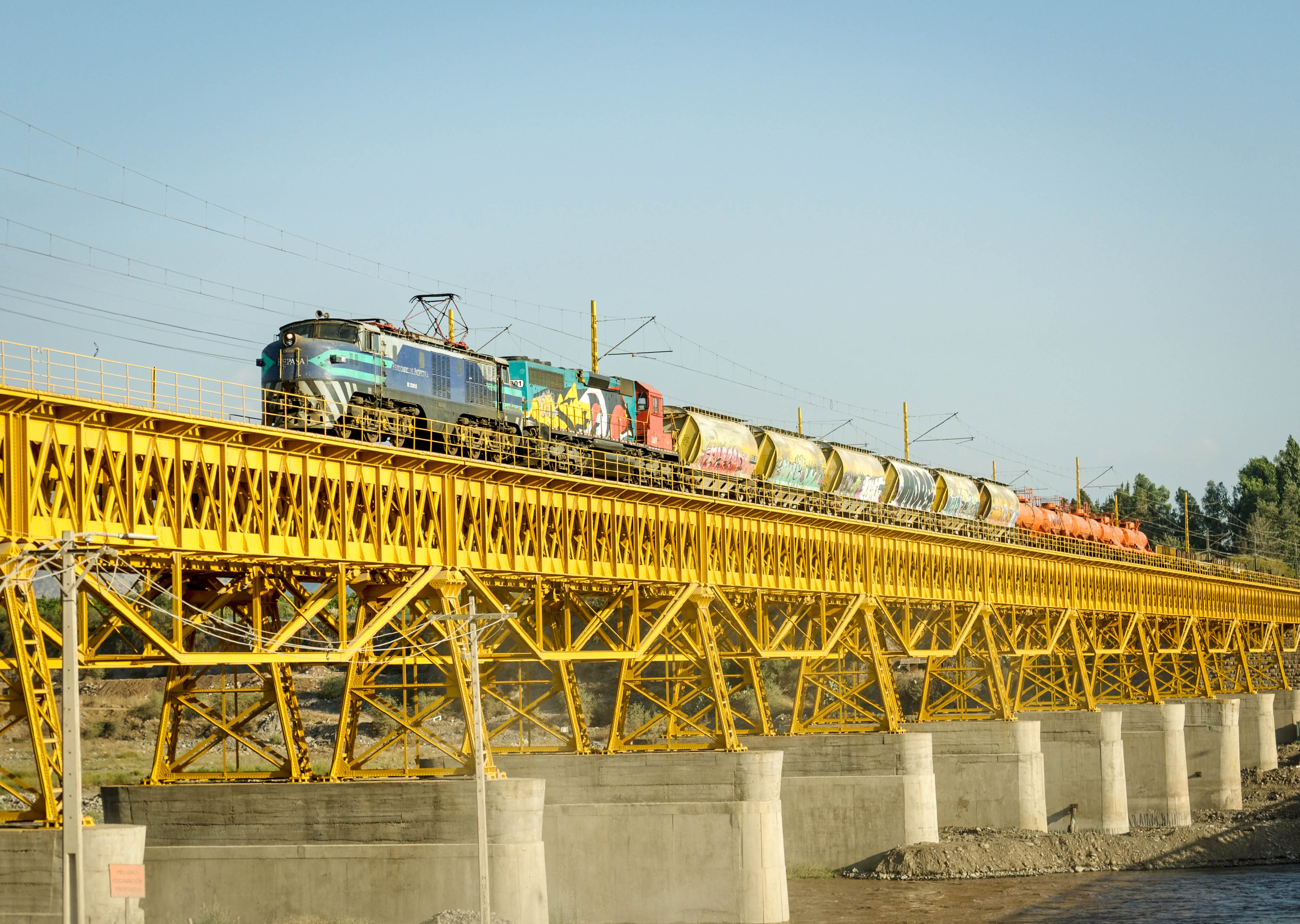 Un carguero, buena luz y un puente que es un clásico a la hora de gotear un tren que sea fuera de los comunes metros o terras…